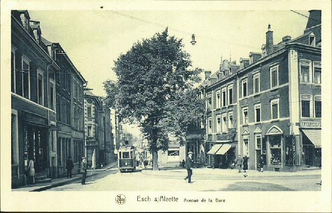 Esch-Alzette, le Minettstram dans l'Avenue de la Gare. Carte postale Edition E. A. Schaack.